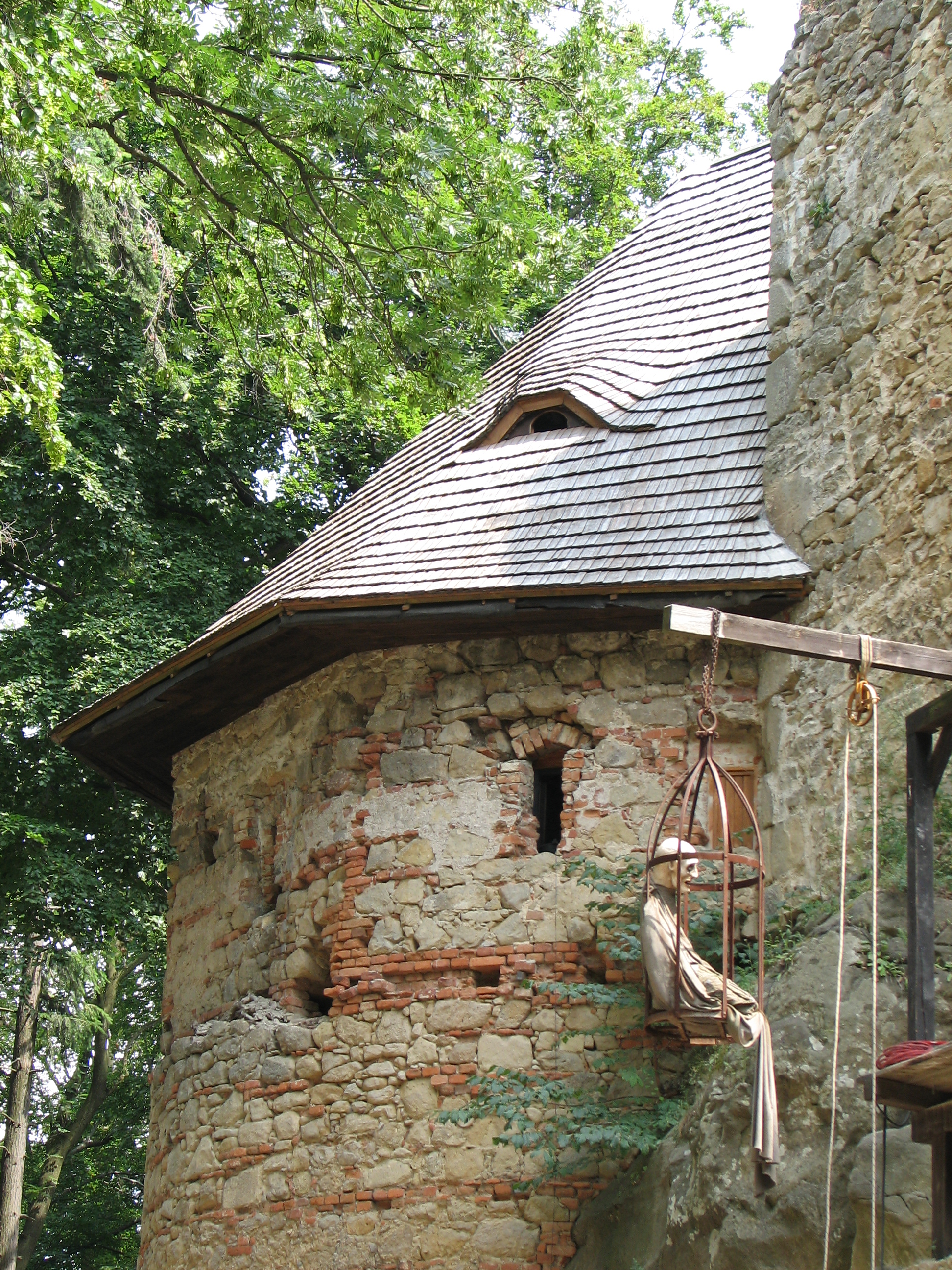 Cimburk Castle near Koryčany, Kroměříž District, Czech Republic